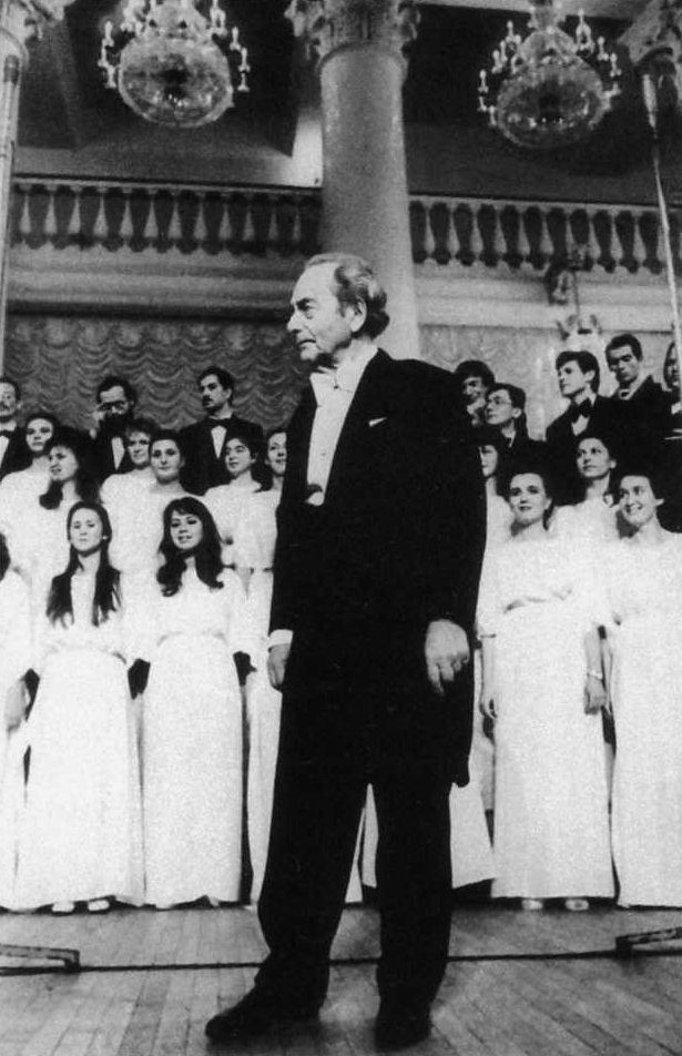 Русиньскый: Grigori Sandler (Григорий Сандлер, Хор Ленинградского радио и телевидения)